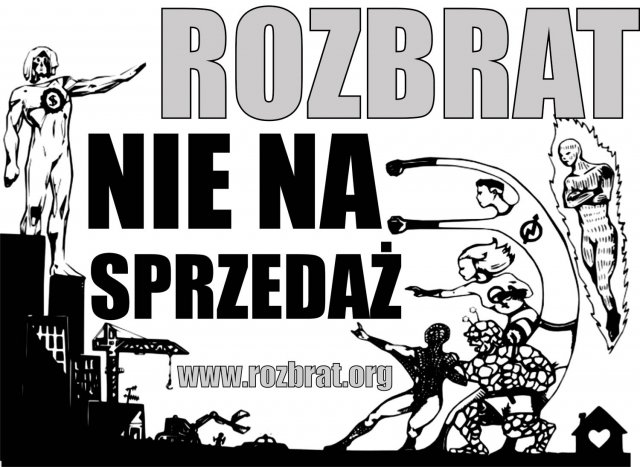 Zdjęcie ze strony skłotu Rozbrat. Za zgodą kolektywu.